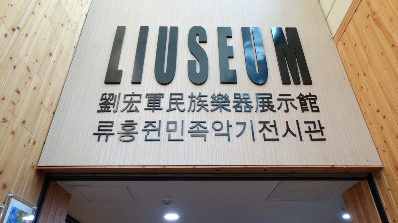 류홍쥔 민족악기전시관